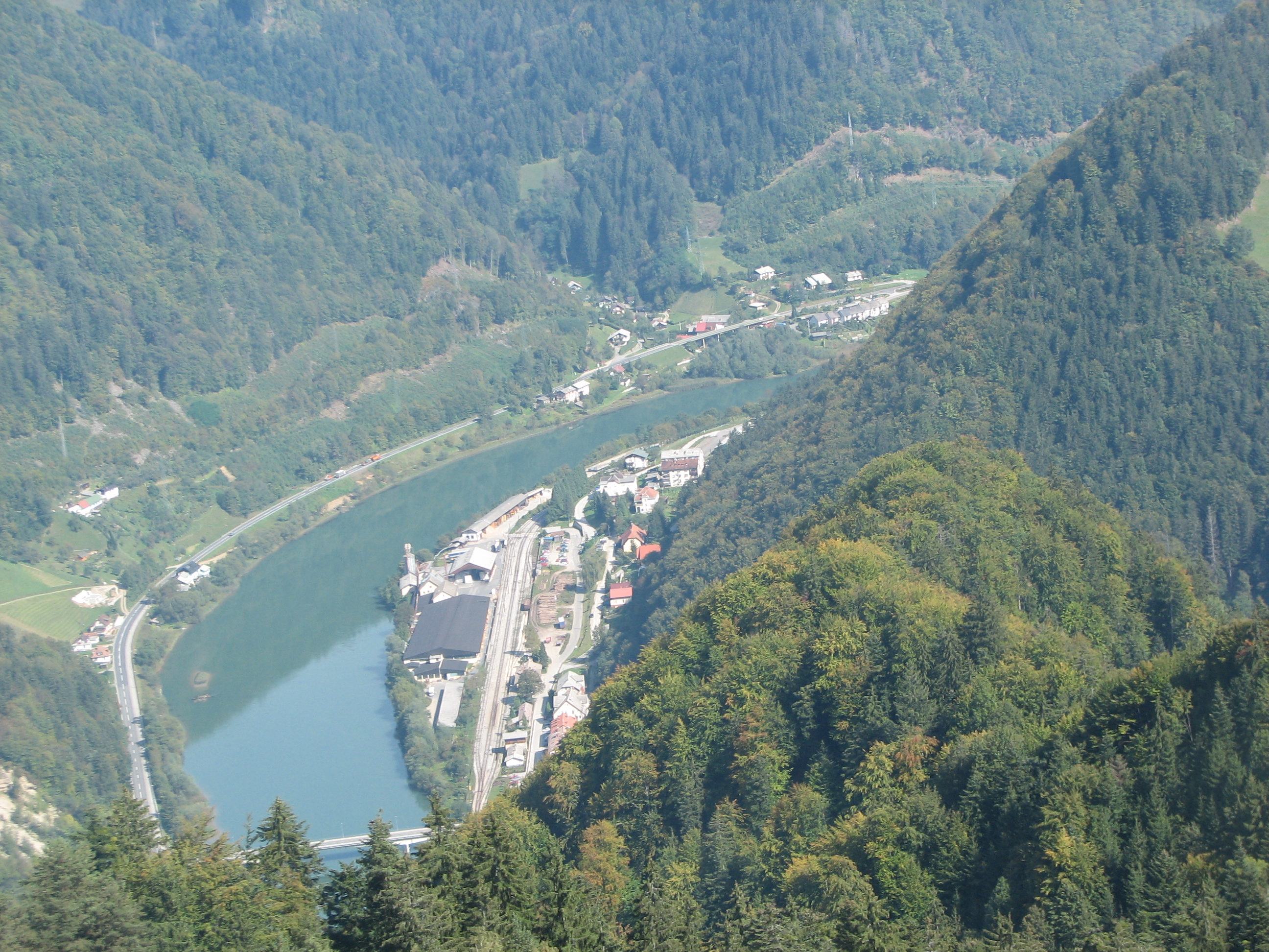 Podvelka